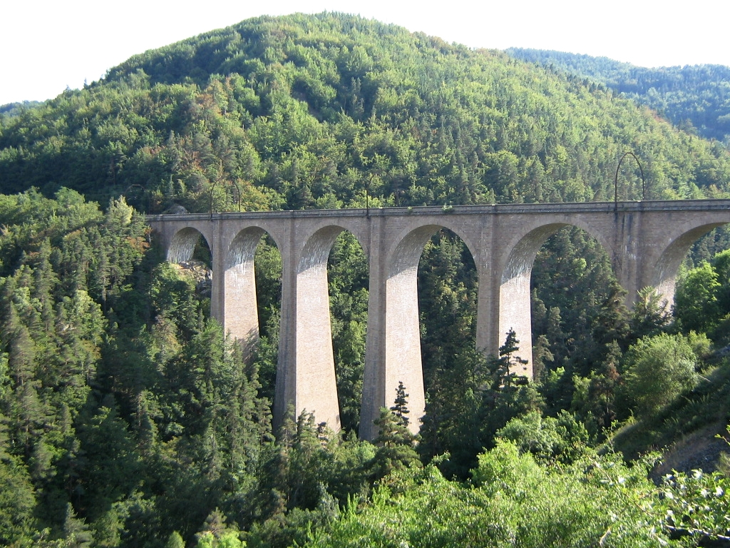 Viaduc de l'Enfer (Lozère)